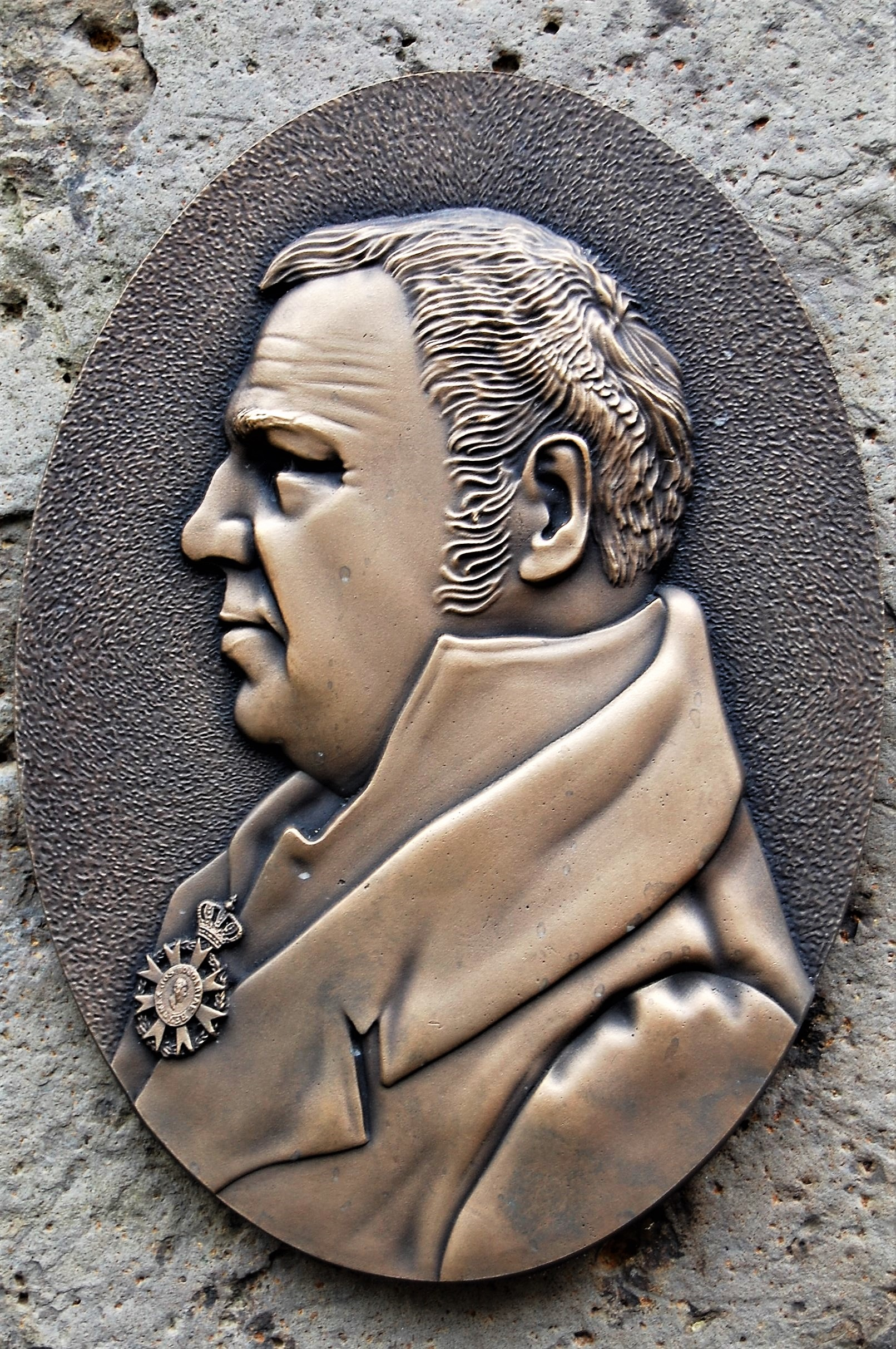 Bildnis (Bronzeplatte) des Mathias von Flurl (1756-1823), Begründer der Mineralogie und Geologie in Bayern, auf einem am 15. Juli 2017 auf dem Bad Kissinger Kapellenfriedhof enthüllten Denkmal, wo Flurl an seinem Todestag 27. Juli 1823 beigesetzt wurde.